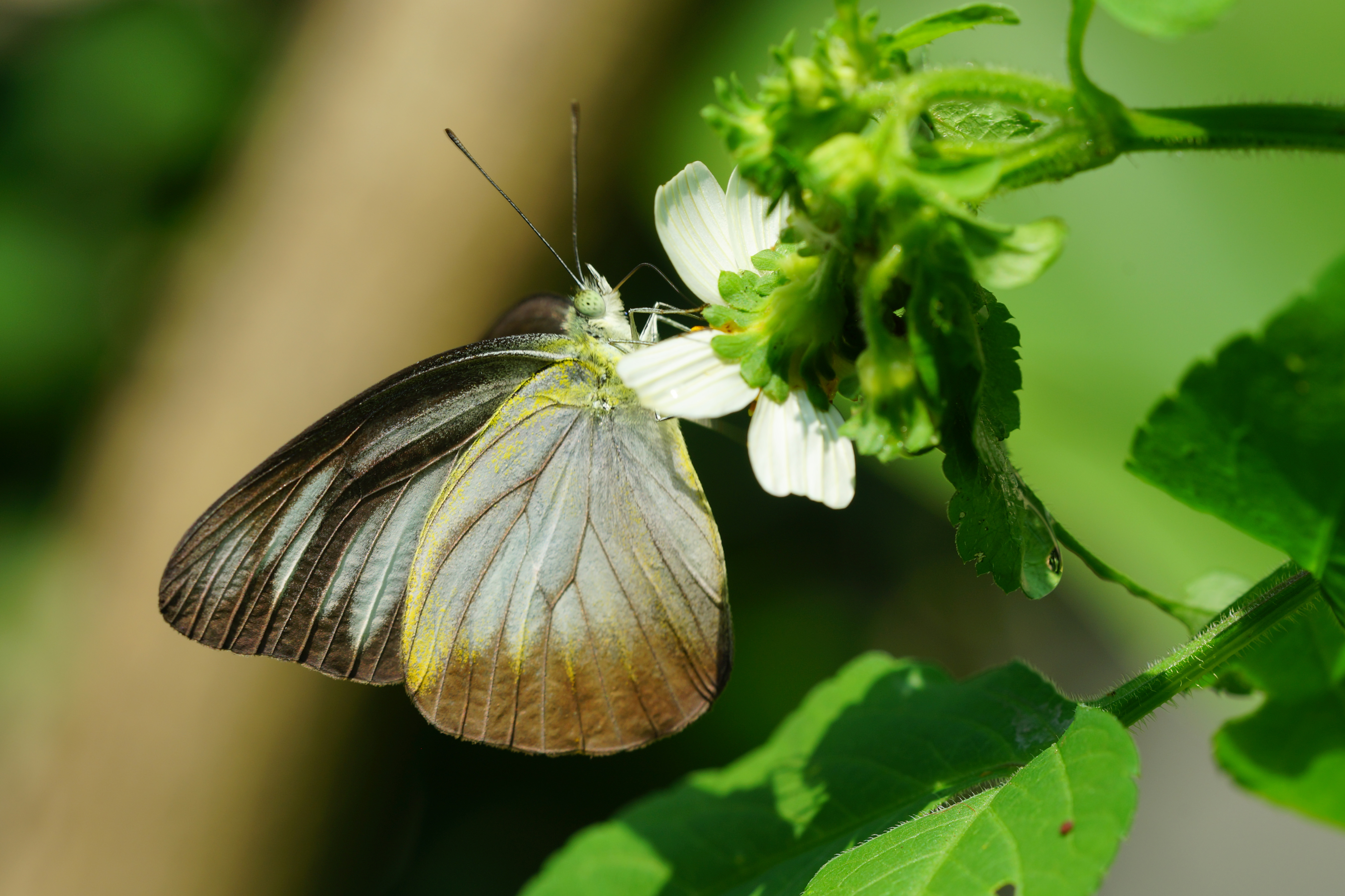 中文（台灣）: 異色尖粉蝶 Appias lyncida eleonora